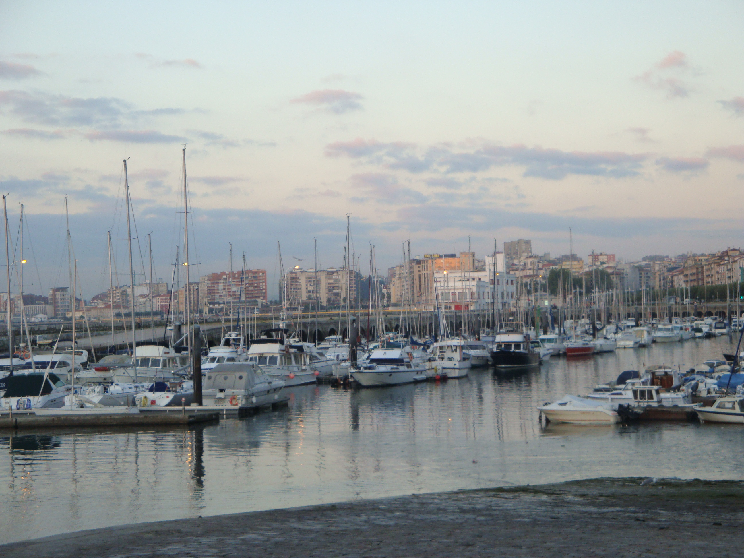 Puerto deportivo de Santander